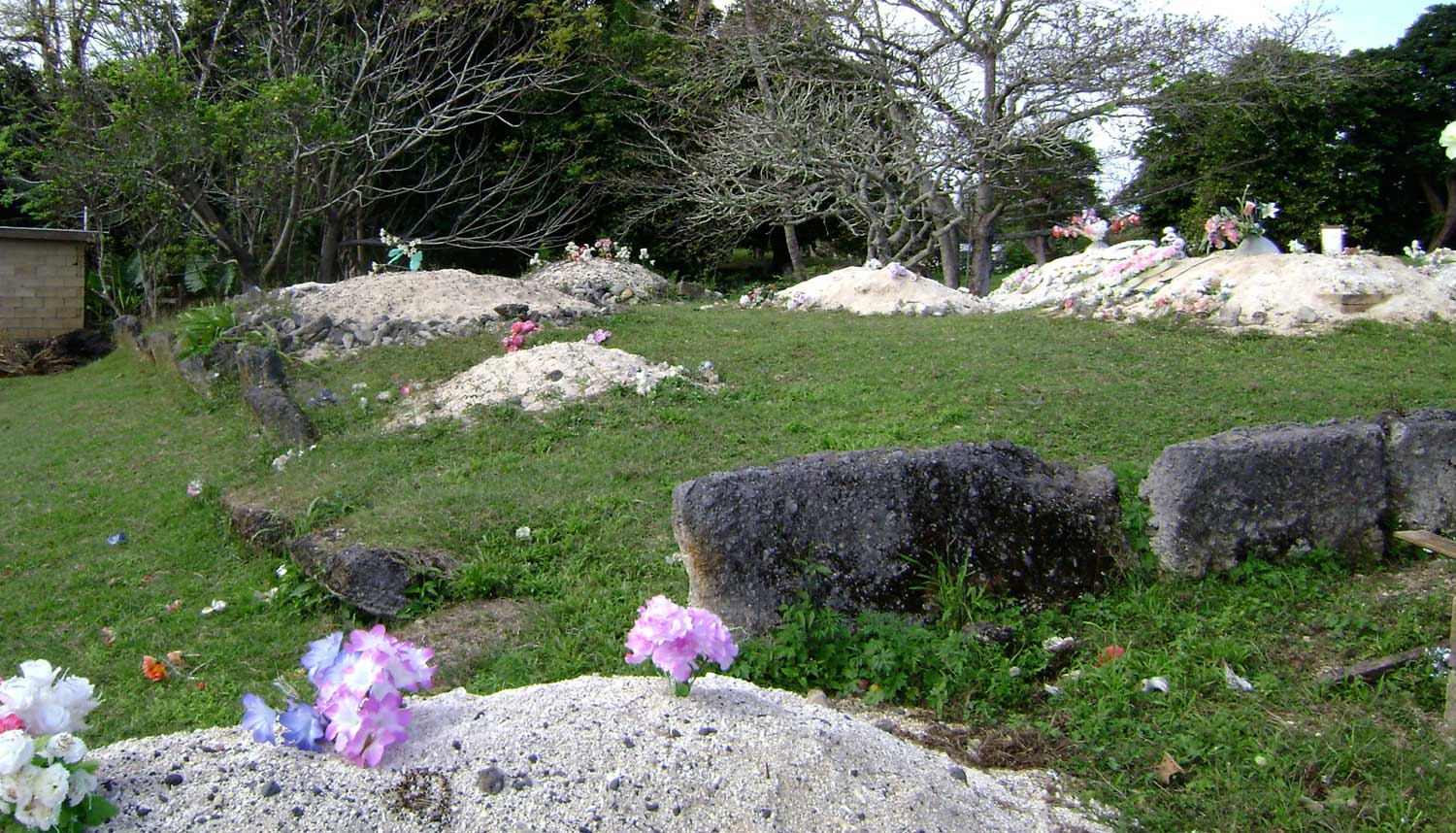 Langi Nukulau I (?), an ancient royal burial mound in Lapaha, Tonga